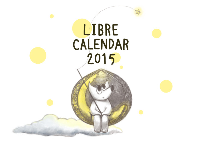 A LILA Szabadművészeti Egyesület 2015 Szabadnaptár borítója készítette: Aryeom Han [1] Forrás: Crédit: Cover of the calendar ("Fishing Night", by Aryeom Han, Creative Commons attribution)